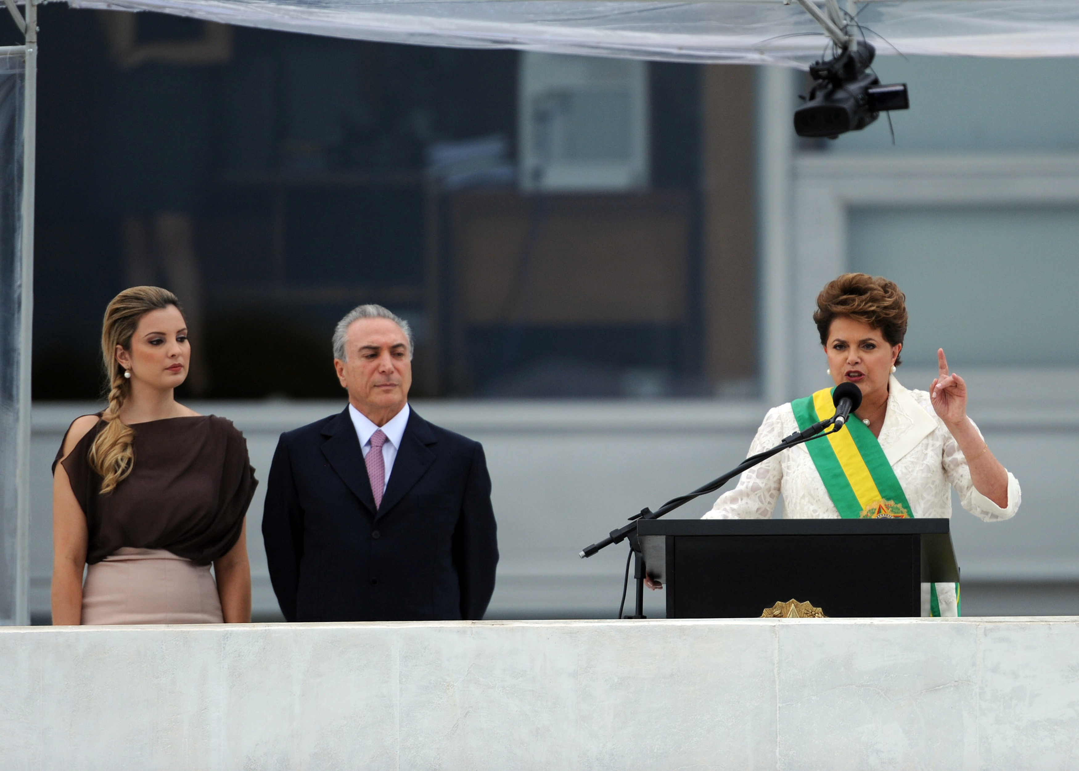 A presidente empossada Dilma Rousseff discursa ao povo no parlatório do Palácio do Planalto, ao lado do vice Michel Temer e de sua esposa. Brasília, 1º de janeiro de 2011.